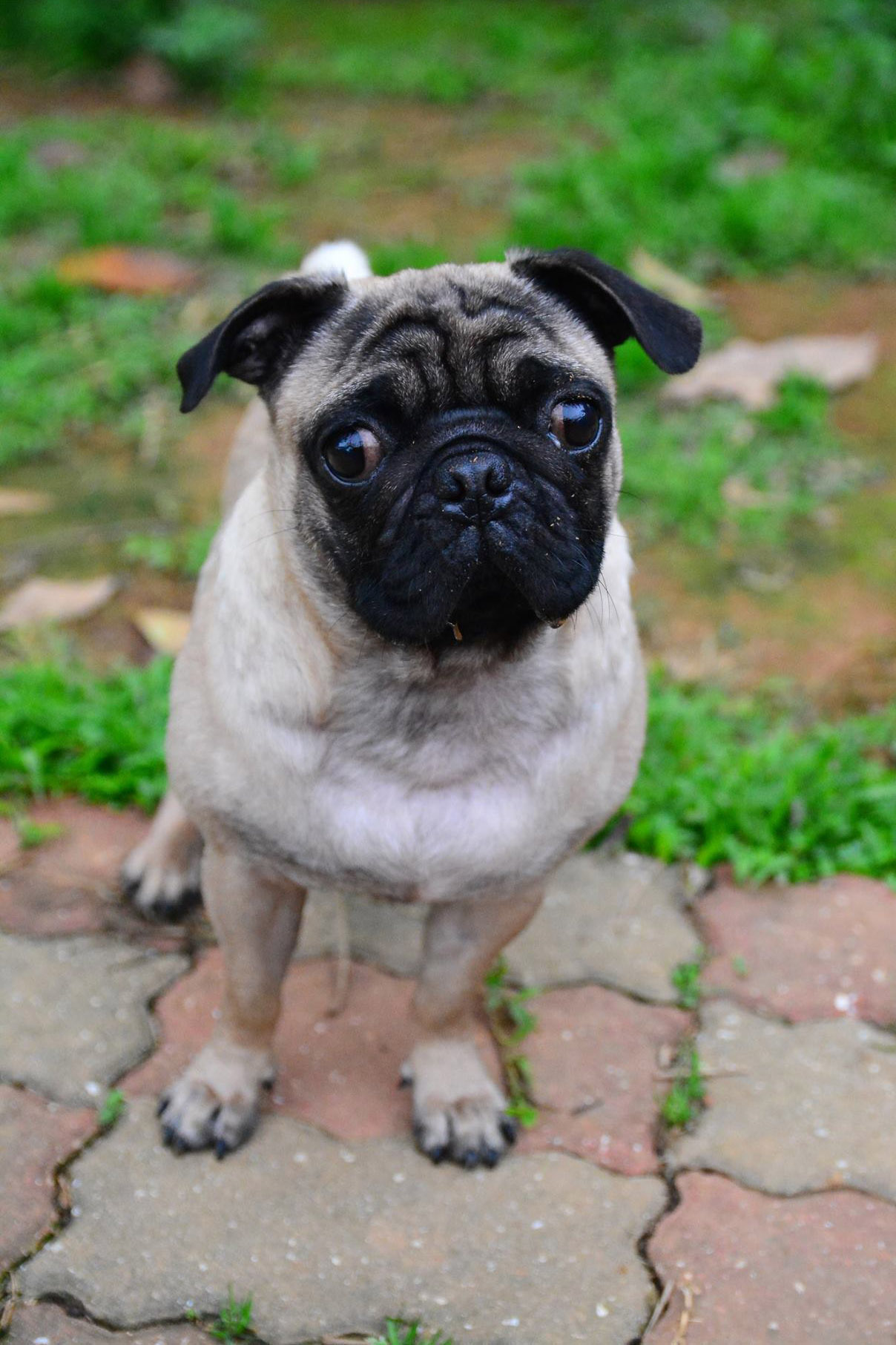 成犬後，體重需要額外關照，建議控制在8kg左右，以維護健康。